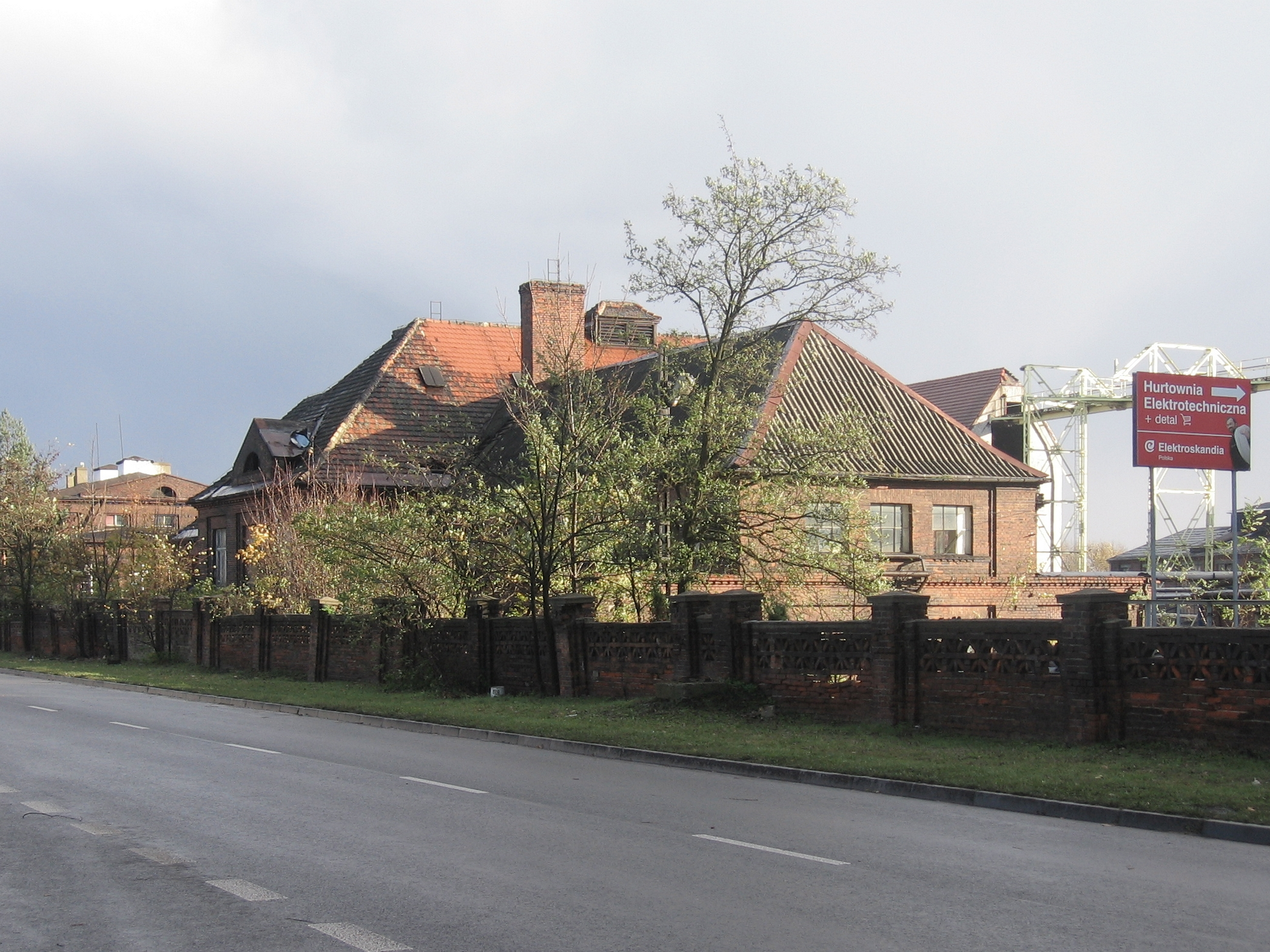 Budynek biurowy kopalni Neue Bleischarley (późniejsze Zakłady Górnicze im. Juliana Marchlewskiego) z około 1926 roku, ul. Siemianowicka.